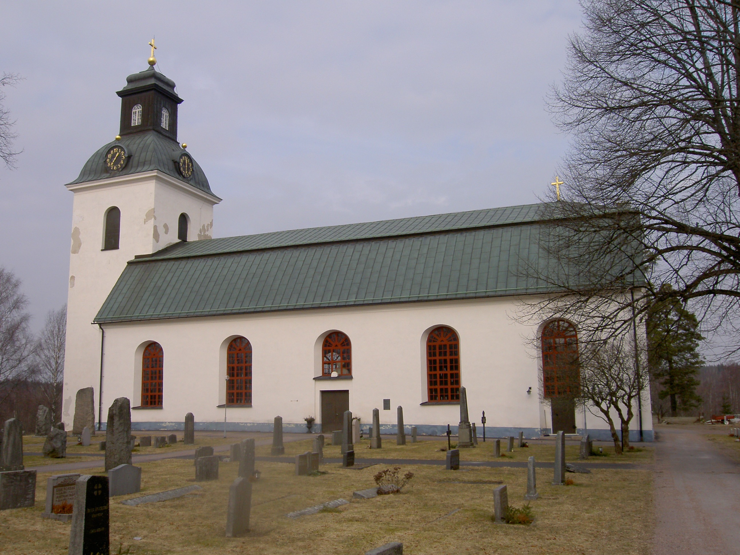 Garpenbergs kyrka, Garpenberg, Sverige/Sweden